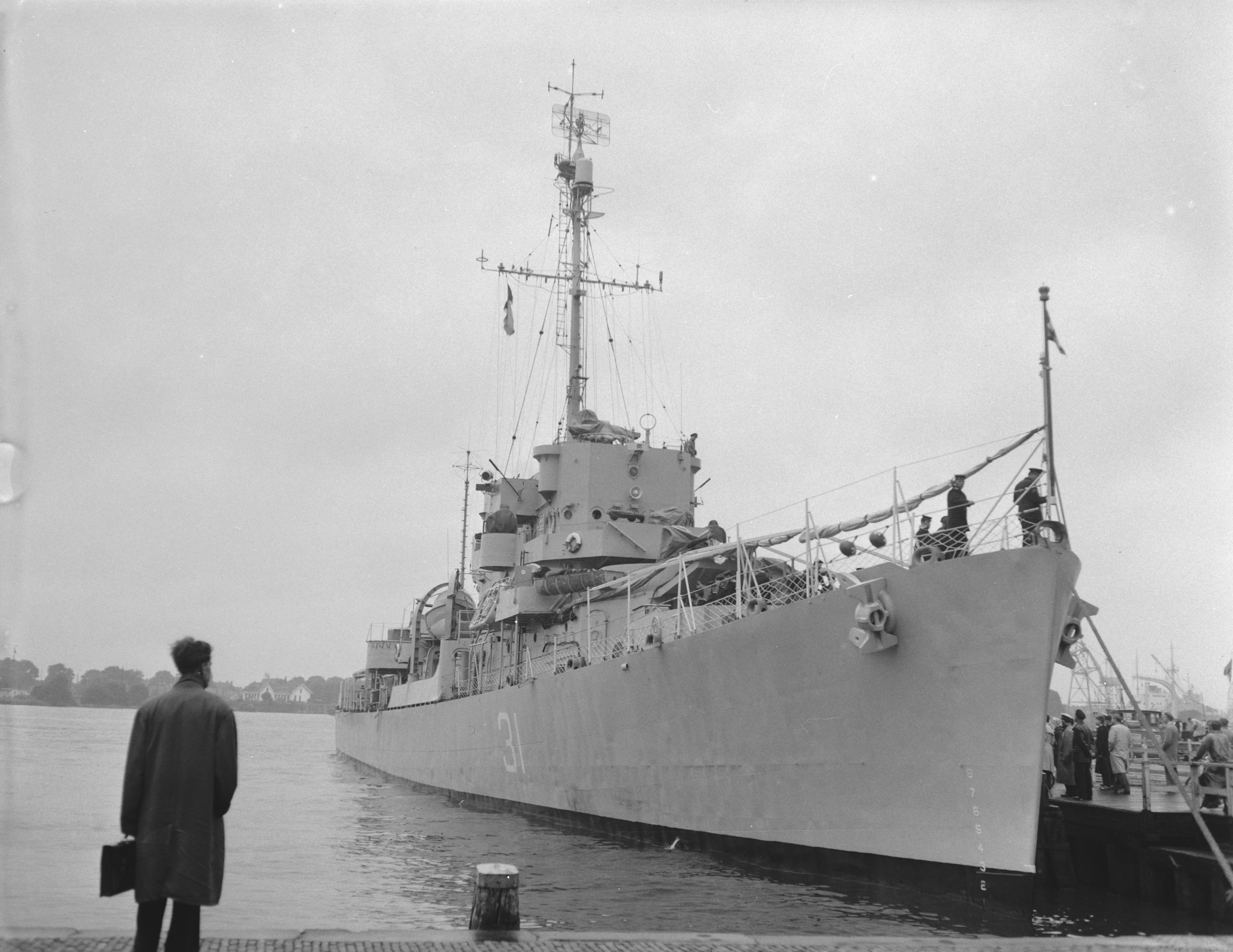 Collectie / Archief : Fotocollectie Anefo Reportage / Serie : [ onbekend ] Beschrijving : Aankomst Griekse fregat Ierax (D31) te Amsterdam Datum : 5 augustus 1958 Locatie : Amsterdam, Noord-Holland Trefwoorden : AANKOMST Fotograaf : Rossem, Wim van / Anefo Auteursrechthebbende : Nationaal Archief Materiaalsoort : Negatief (zwart/wit) Nummer archiefinventaris : bekijk toegang 2.24.01.04 Bestanddeelnummer : 909-7641